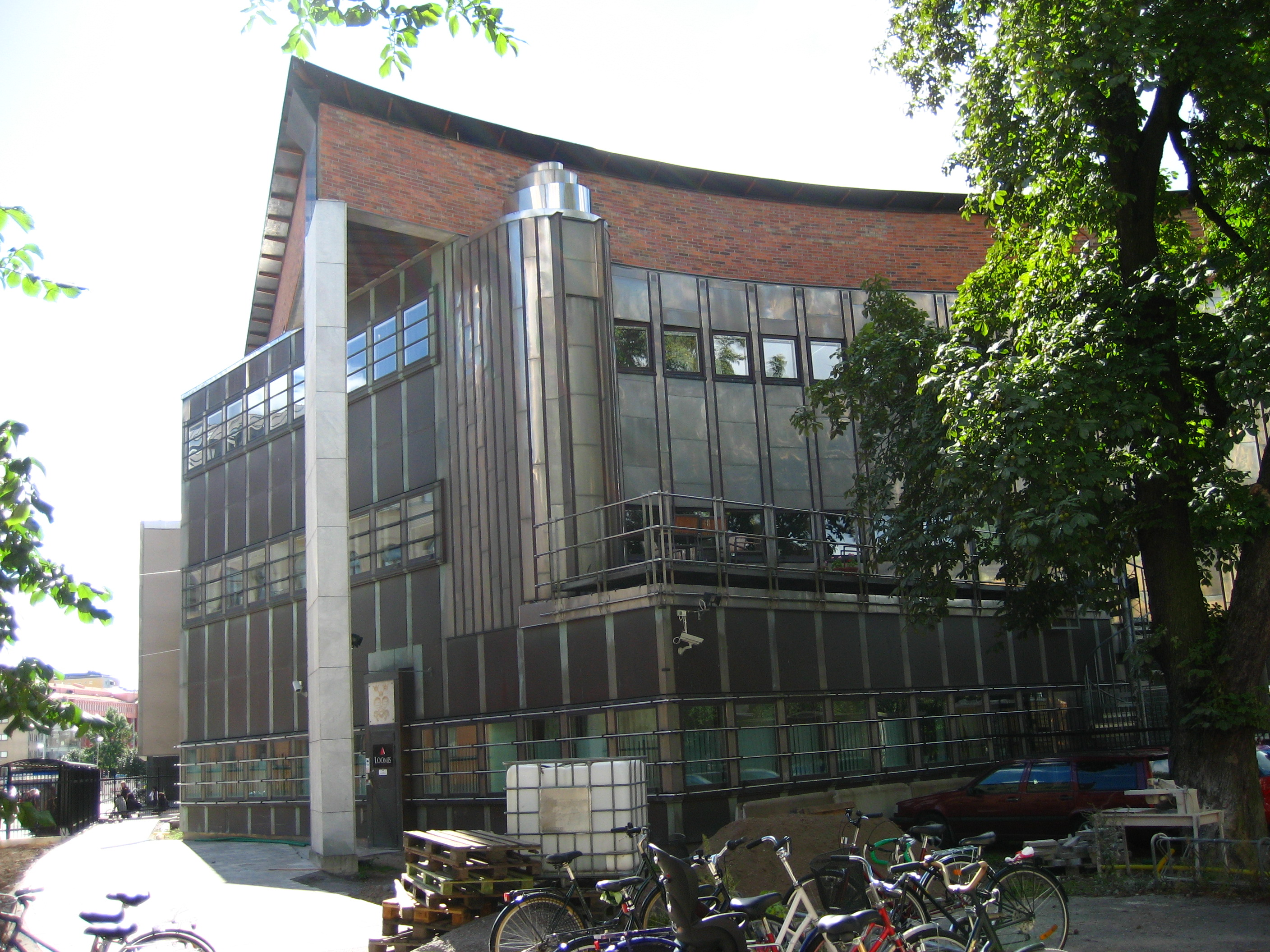 Riksbanken, Örebro, Sweden